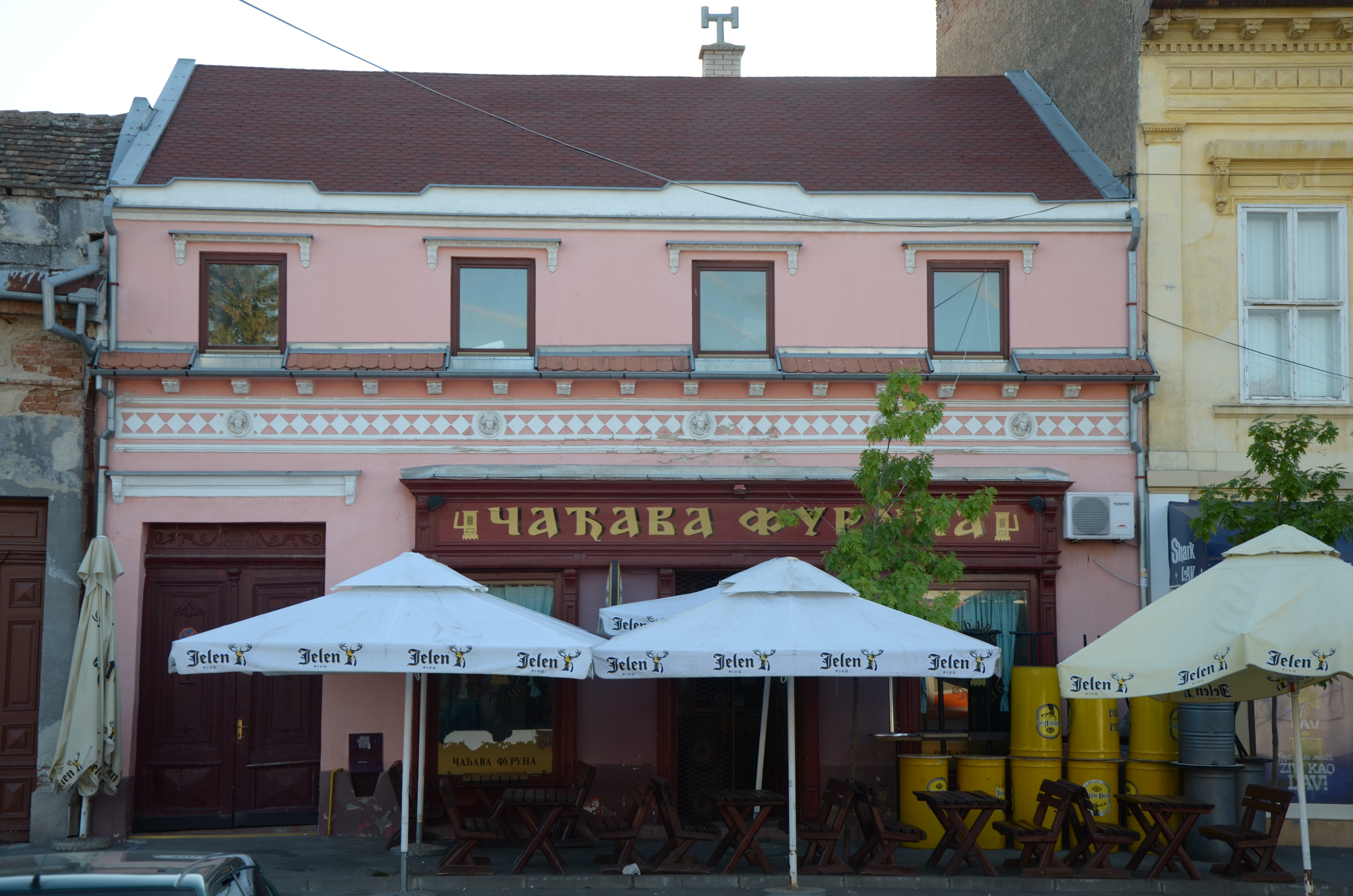 Кућа звана Код два пиштоља у улици Саве Ковачевића број 15 у Вршцу